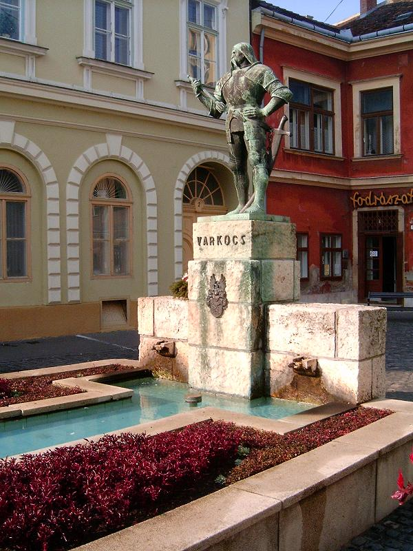 Erdey Dezső: Varkocs György szobra, Székesfehérvár, 1543-ban a vár védelmében hősi halált halt várkapitány tiszteletére 1938-ban állították Photo by Arpad Horvath, 2005